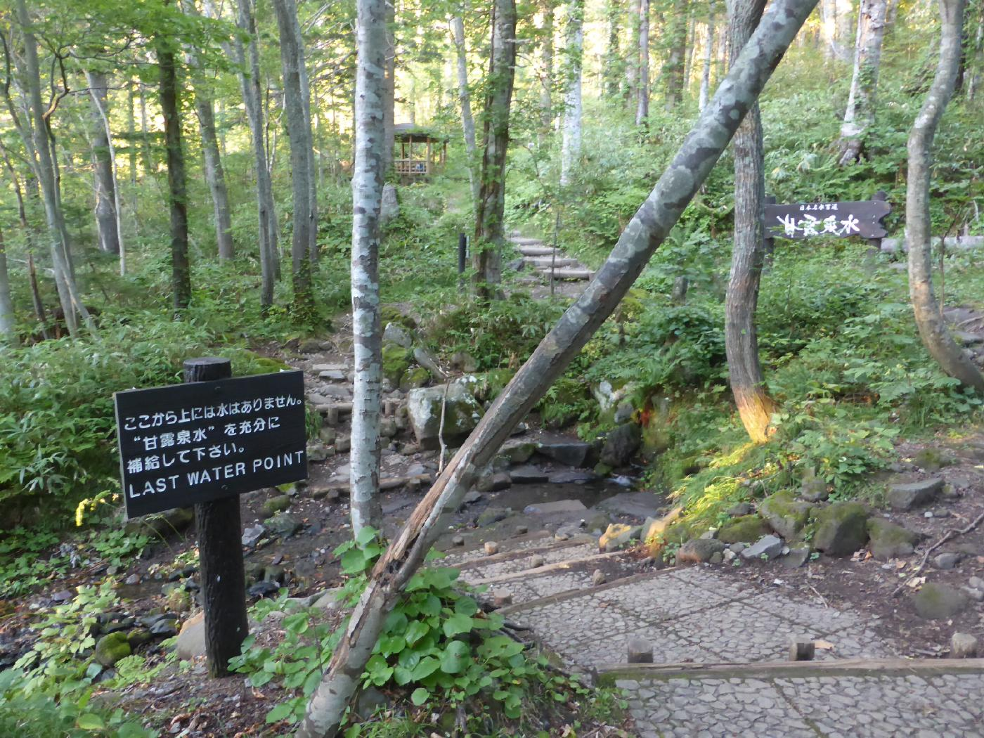 名水百選に選ばれている甘露泉水